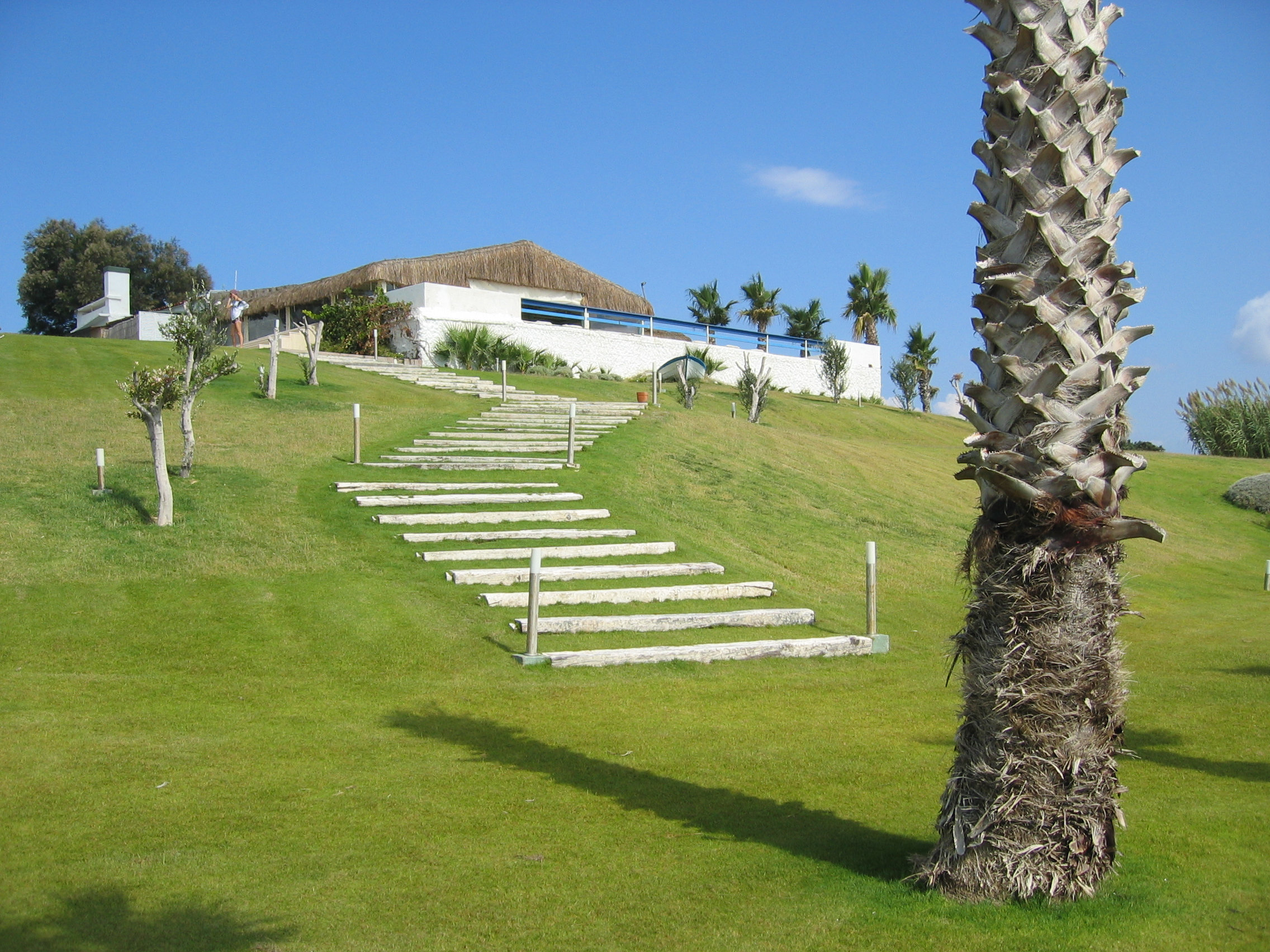 Altinkum Beaches 05 (October2009)